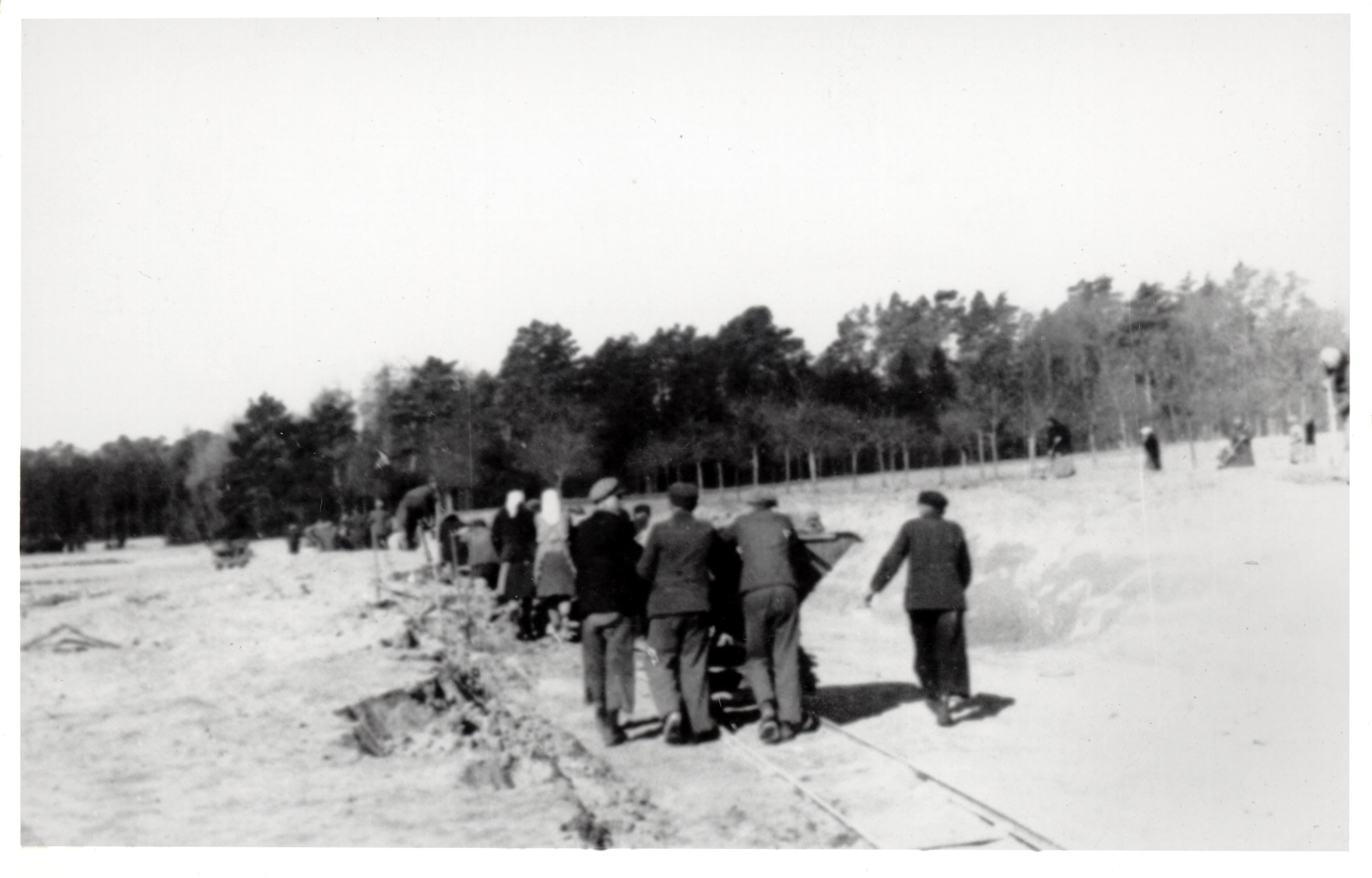 Fotografie dokumentujące budowę obozu niemieckiej Centrali Przesiedleńczej w Potu-licach dla rodzin polskich wysiedlonych z Pomorza.